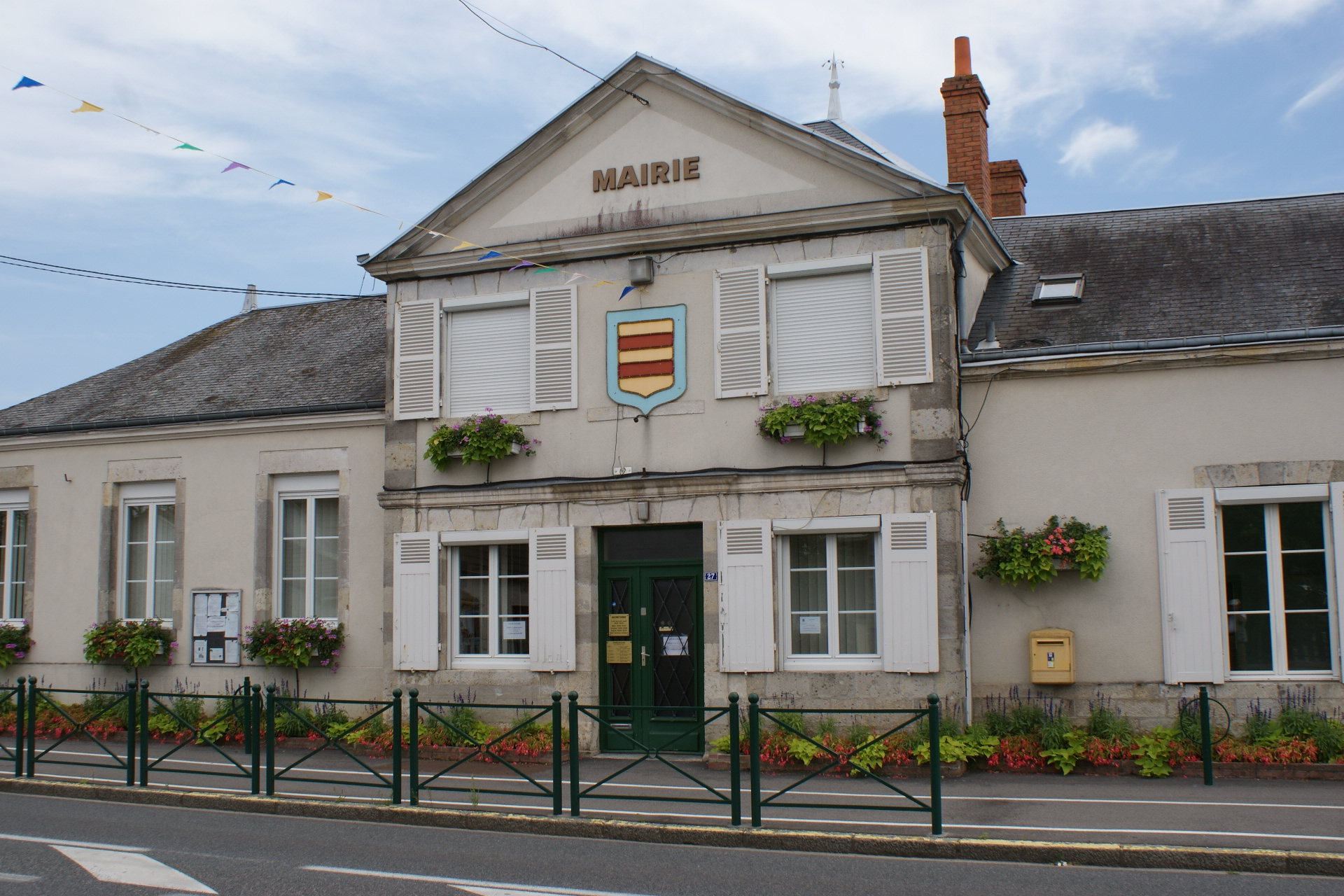 Mairie de Darvoy, Loiret, Centre, France